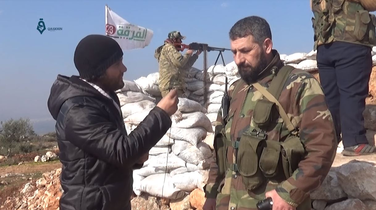 Rebelles de la 23e division de l'Armée syrienne libre, près d'Afrine, le 7 février 2018.